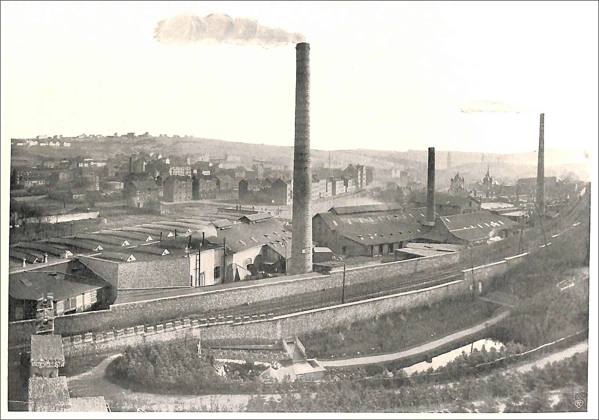 Stollberg im Rheinland - Ansicht der Messingfabrik Matthias Ludolph Schleicher.